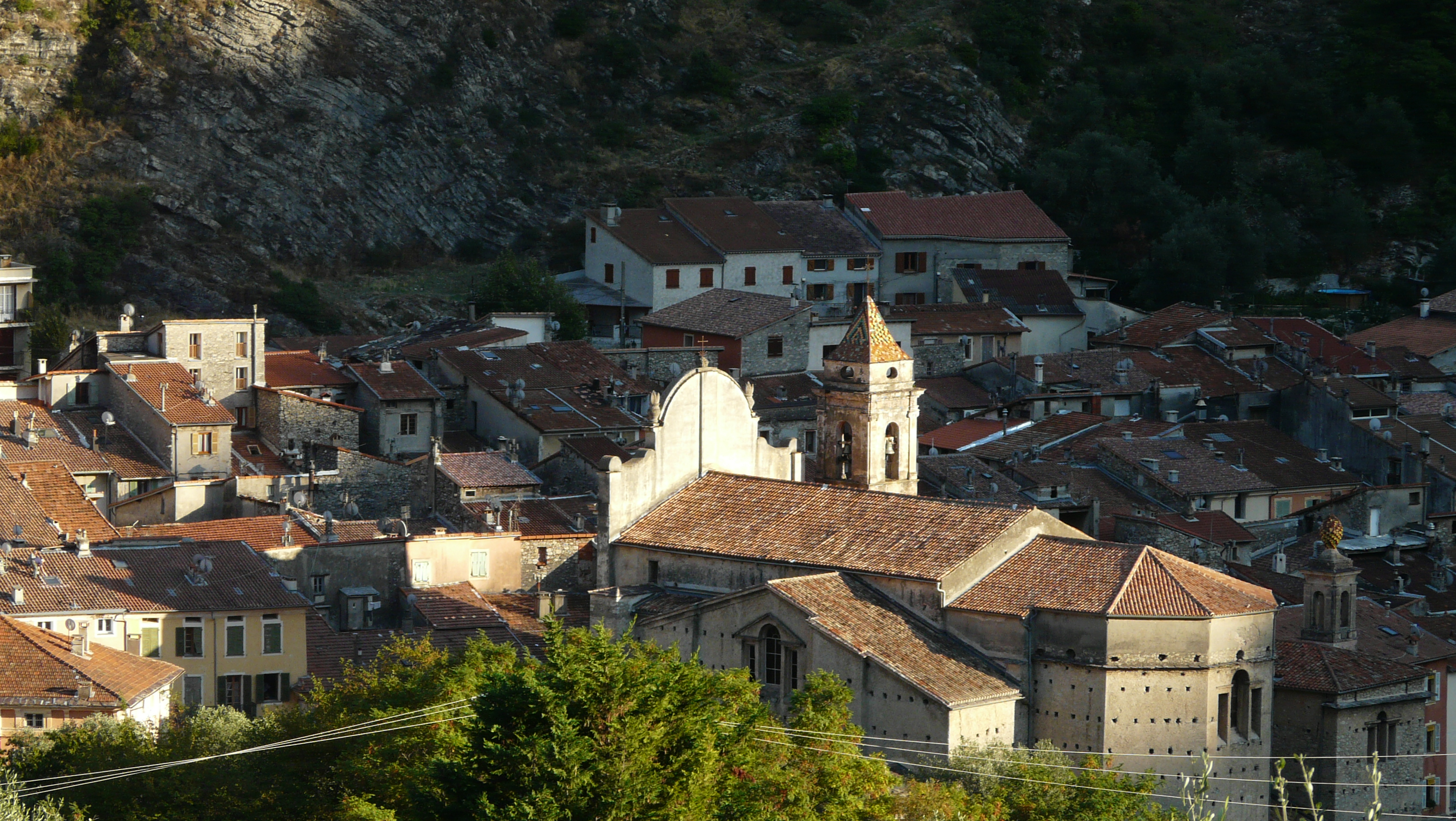 Église Santa-Maria-in-Albis et chapelle des Pénitents noirs (ou chapelle de la Miséricorde). Breil-sur-Roya .